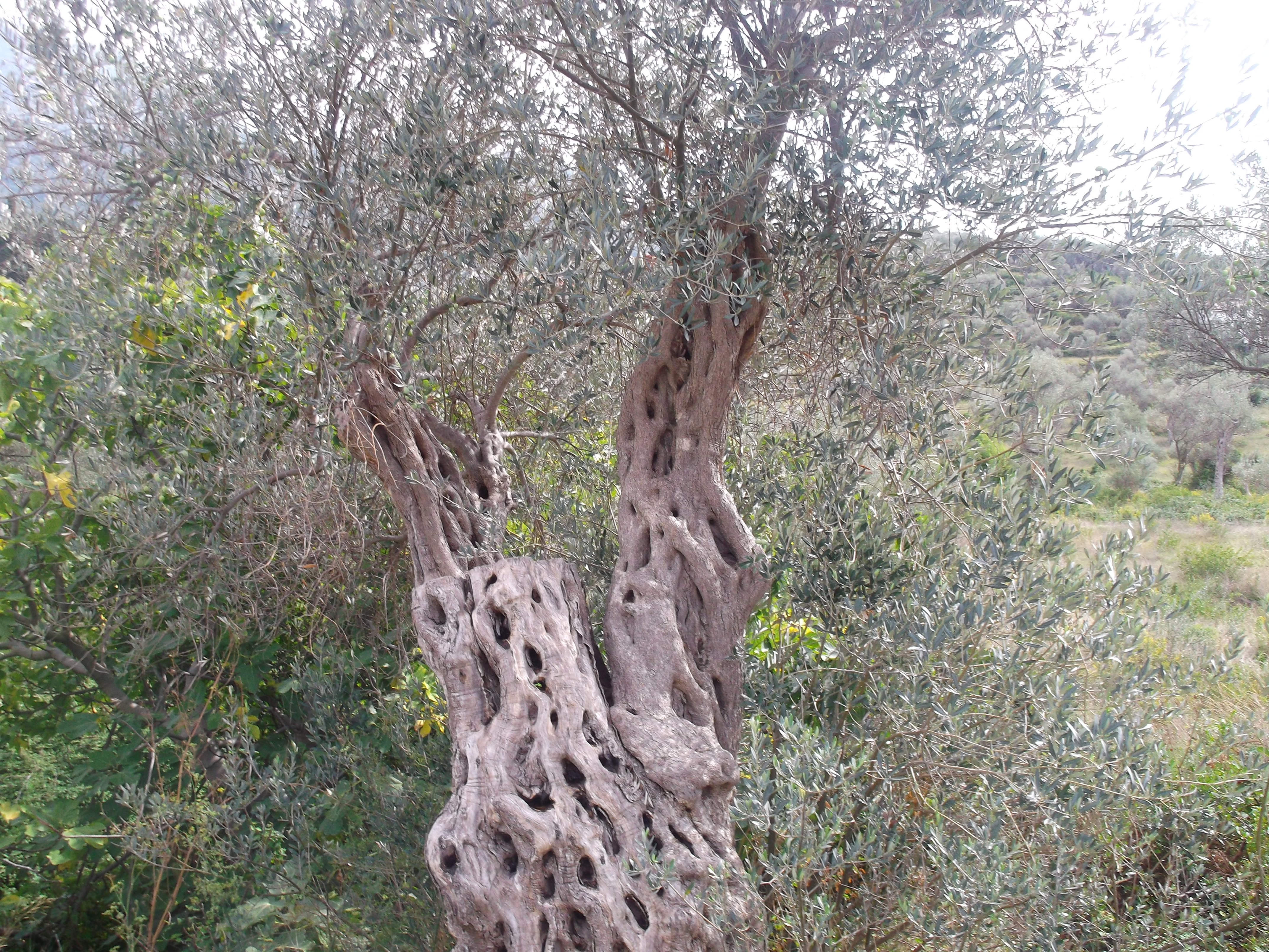 Čeluga, Montenegro